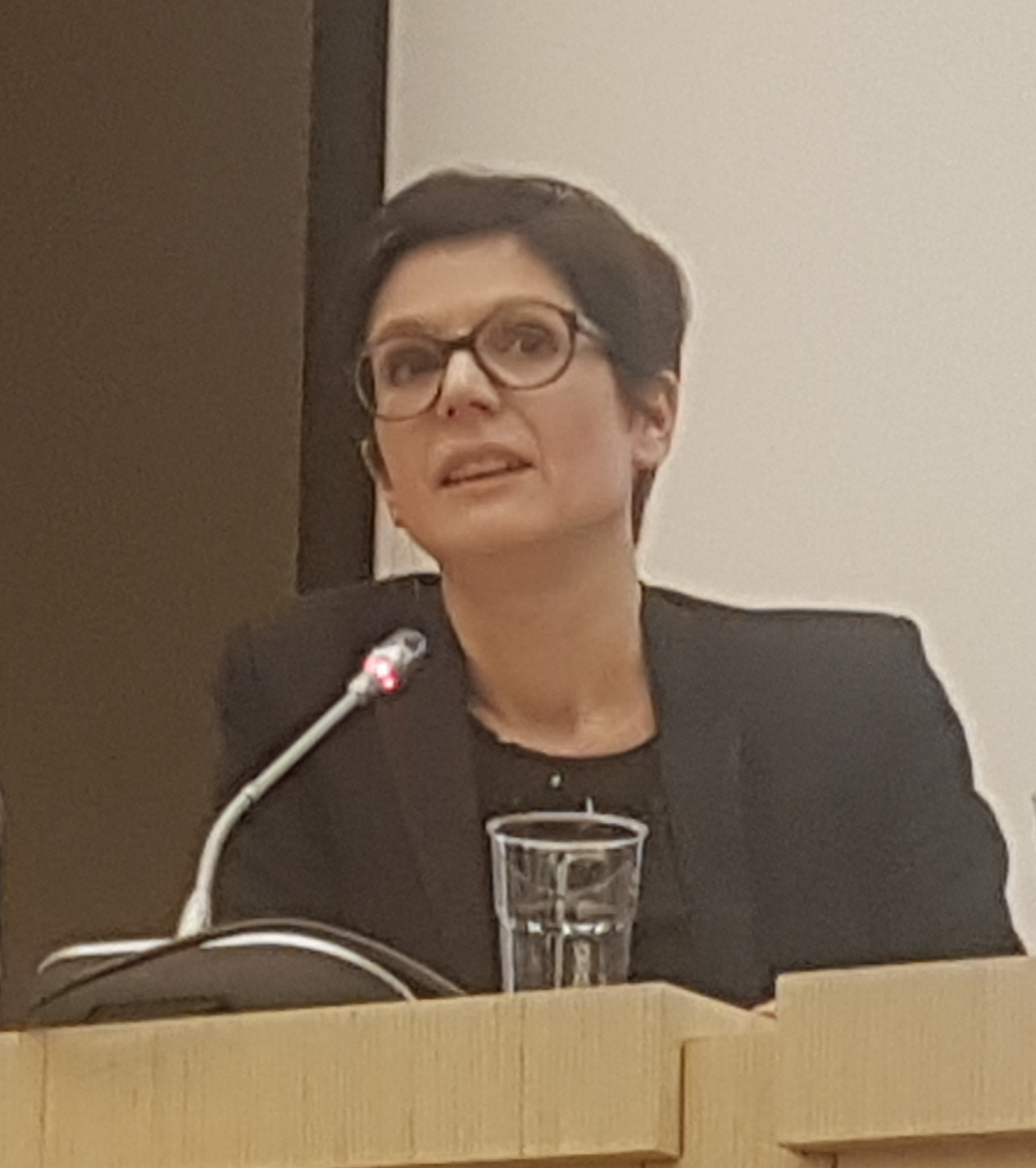 Sandrine Rousseau au forum de Libération "Le pouvoir a-t-il un sexe" le 8 février 2019 à l'Assemblée Nationale